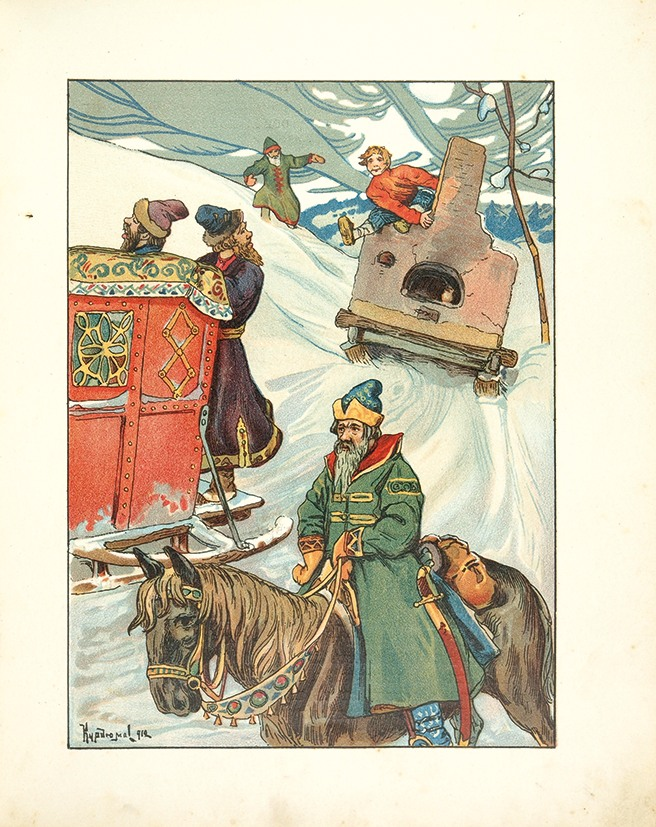 Емеля дурак / худ. В. Курдюмов. М.: Тип. Т-ва И.Д. Сытина, 1913. 18 с., ил. 27×22 см